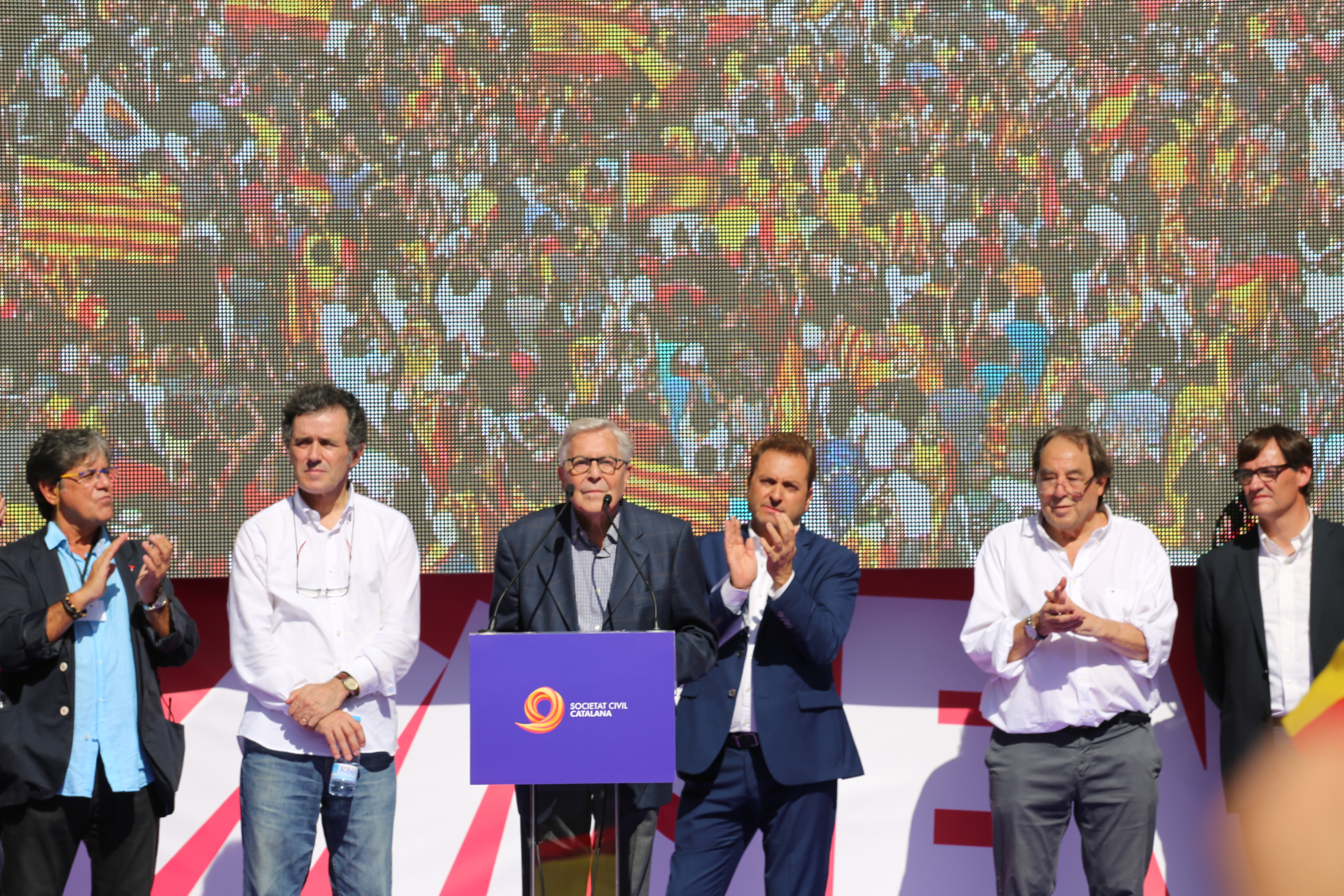 08.10.2017 Manifestació "Prou! Recuperem el seny" - Barcelona